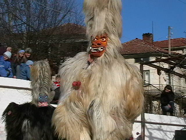 Бабугери